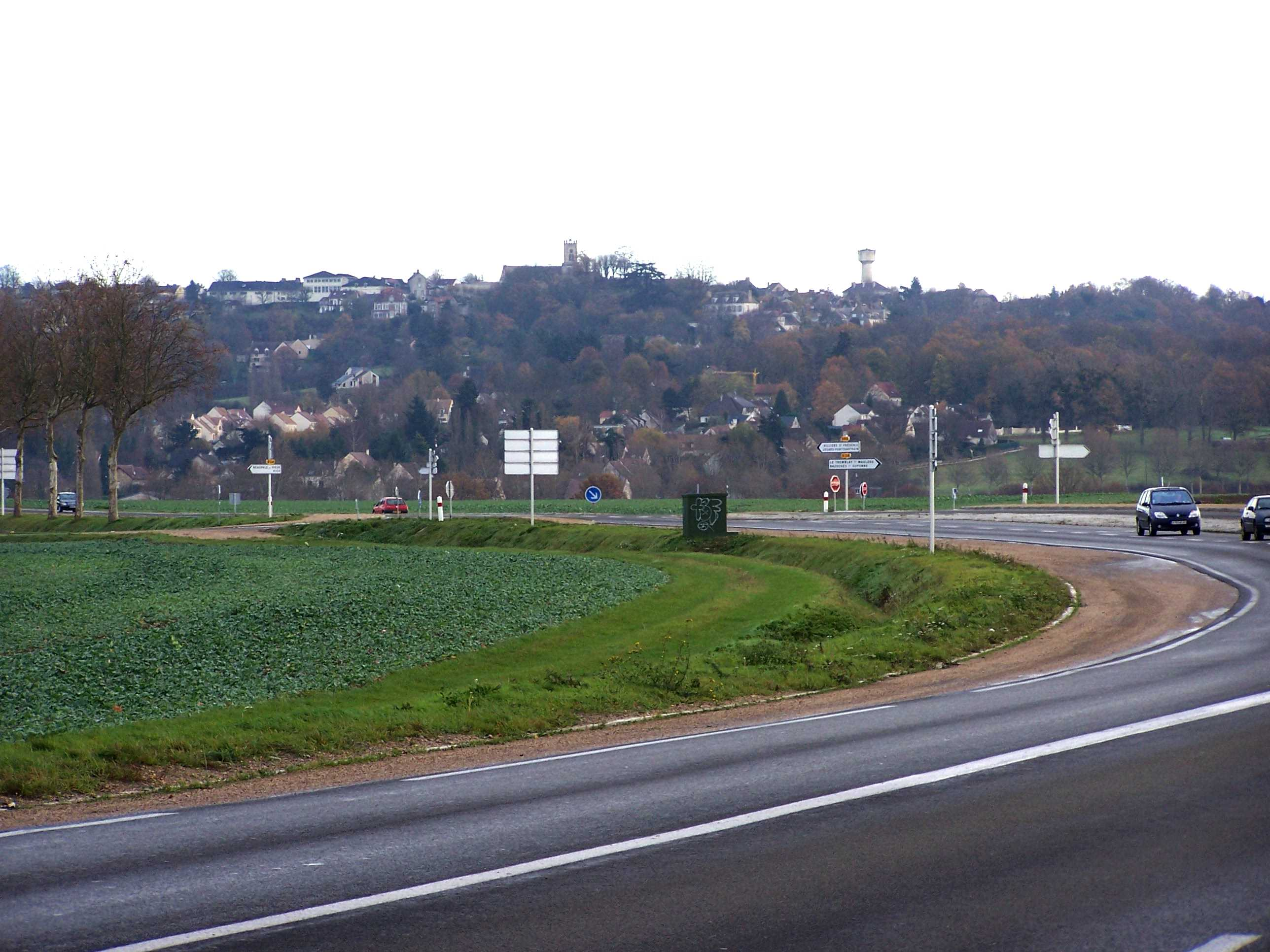 Vue ouest de Neauphle-le-Château (Yvelines, France)